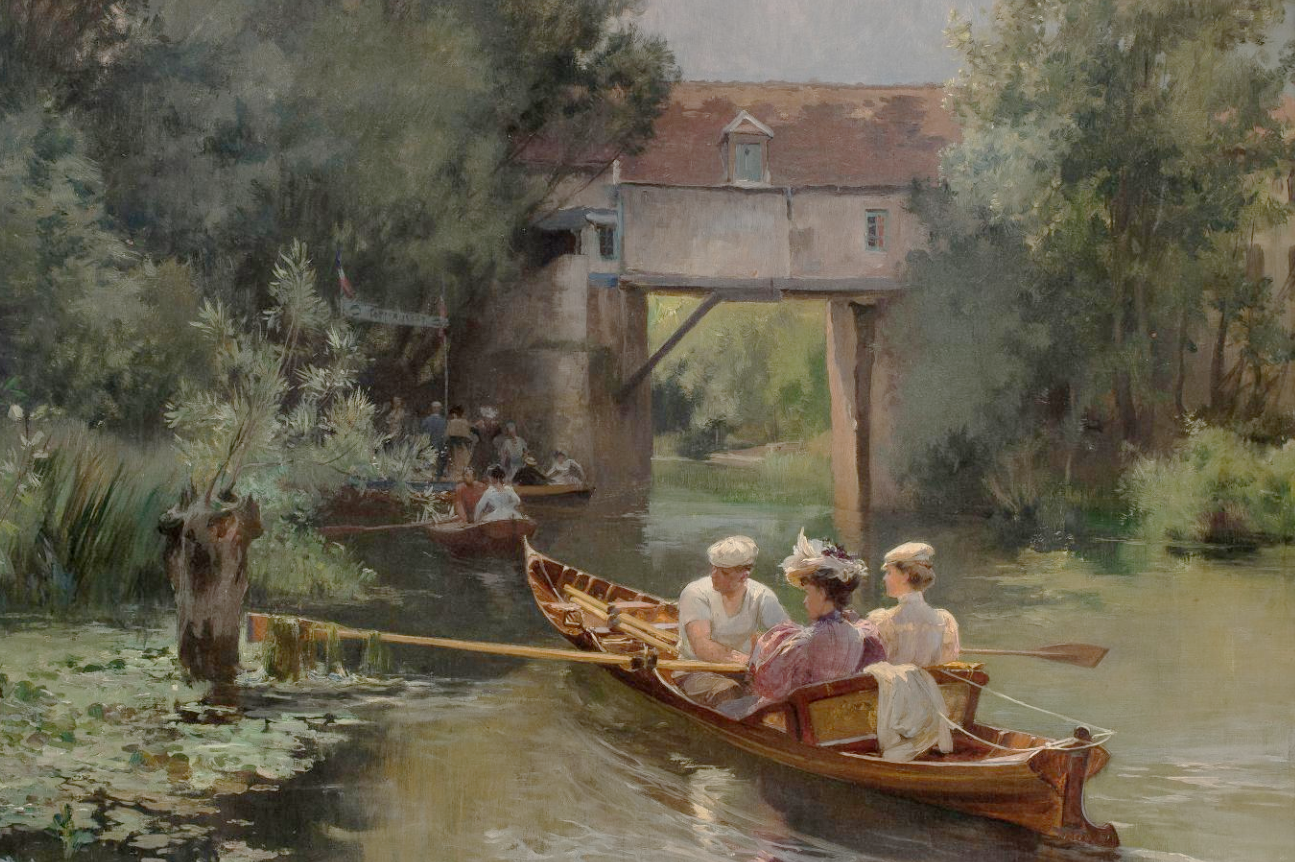 Promenade en barque